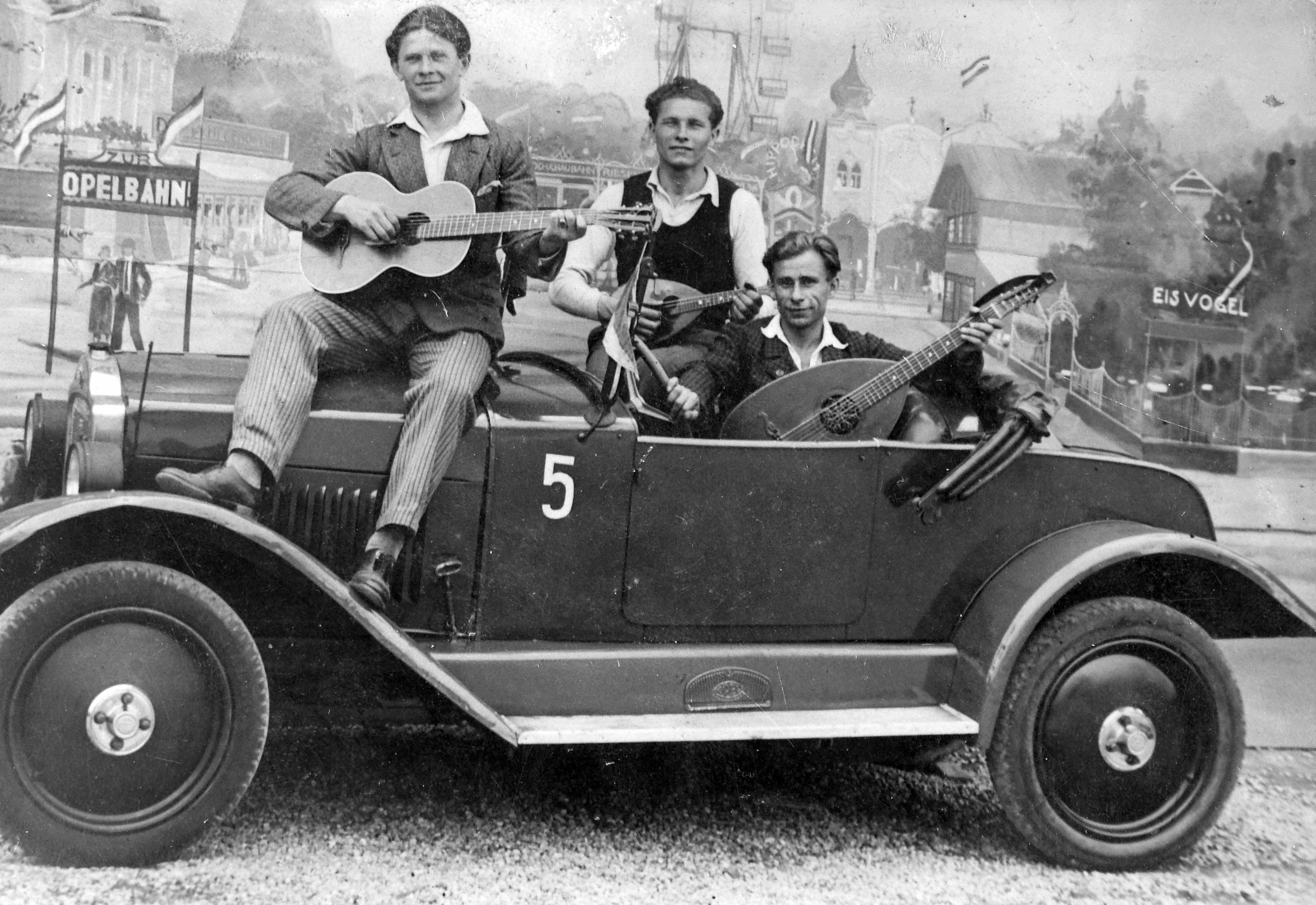 Opel 4/12 PS 'Laubfrosch" típusú személygépkocsi Location: Austria, Vienna Tags: automobile, Opel-brand, Gerrman brand Title: Opel 4/12 PS 'Laubfrosch\